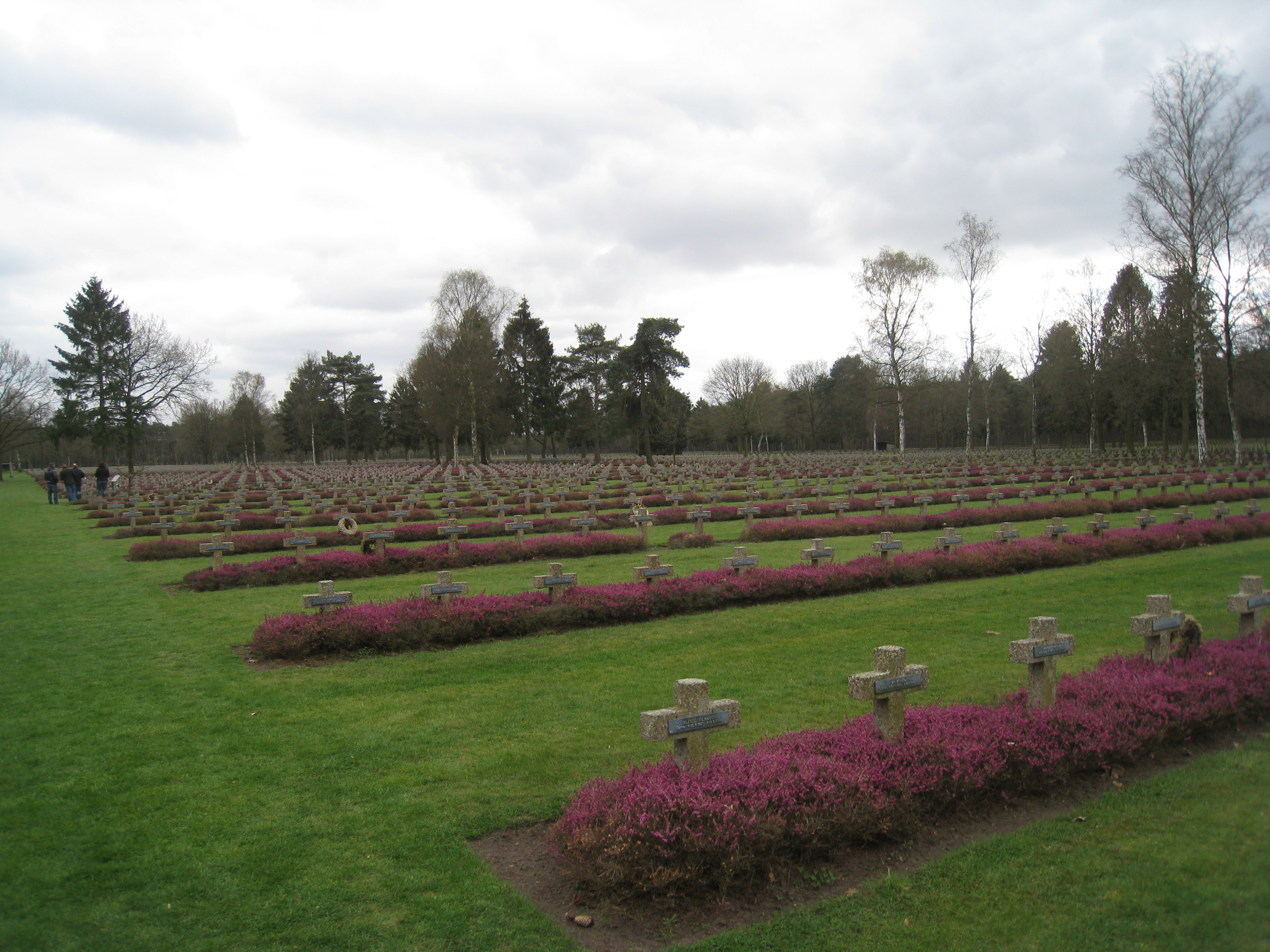 Lommel, Duits Kerkhof (2012)